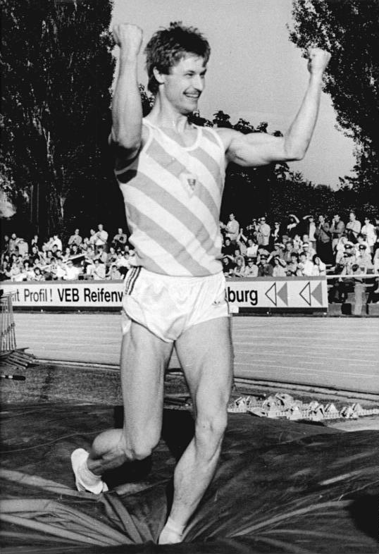 Uwe Langhammer ADN-ZB Oberst 10.6.87 Neubrandenburg: WM-Qualifikation der DDR-Leichtathleten. Freude bei Uwe Langhammer über den neuen DDR-Rekord im Stabhochsprung. Bei der 2. Weltmeisterschafts-Qualifikation der Leichtathleten in Neubrandenburg erzielte der Jenenser 5,60 m und verbesserte damit die alte Bestmarke aus dem Jahre 1984 um fünf Zentimeter.